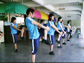 Siswi-siswi SMA Trinitas sedang melakukan stretching